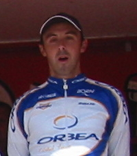 Gorka Arrizabalaga, Orbea team, Euskal Bizikleta 2005